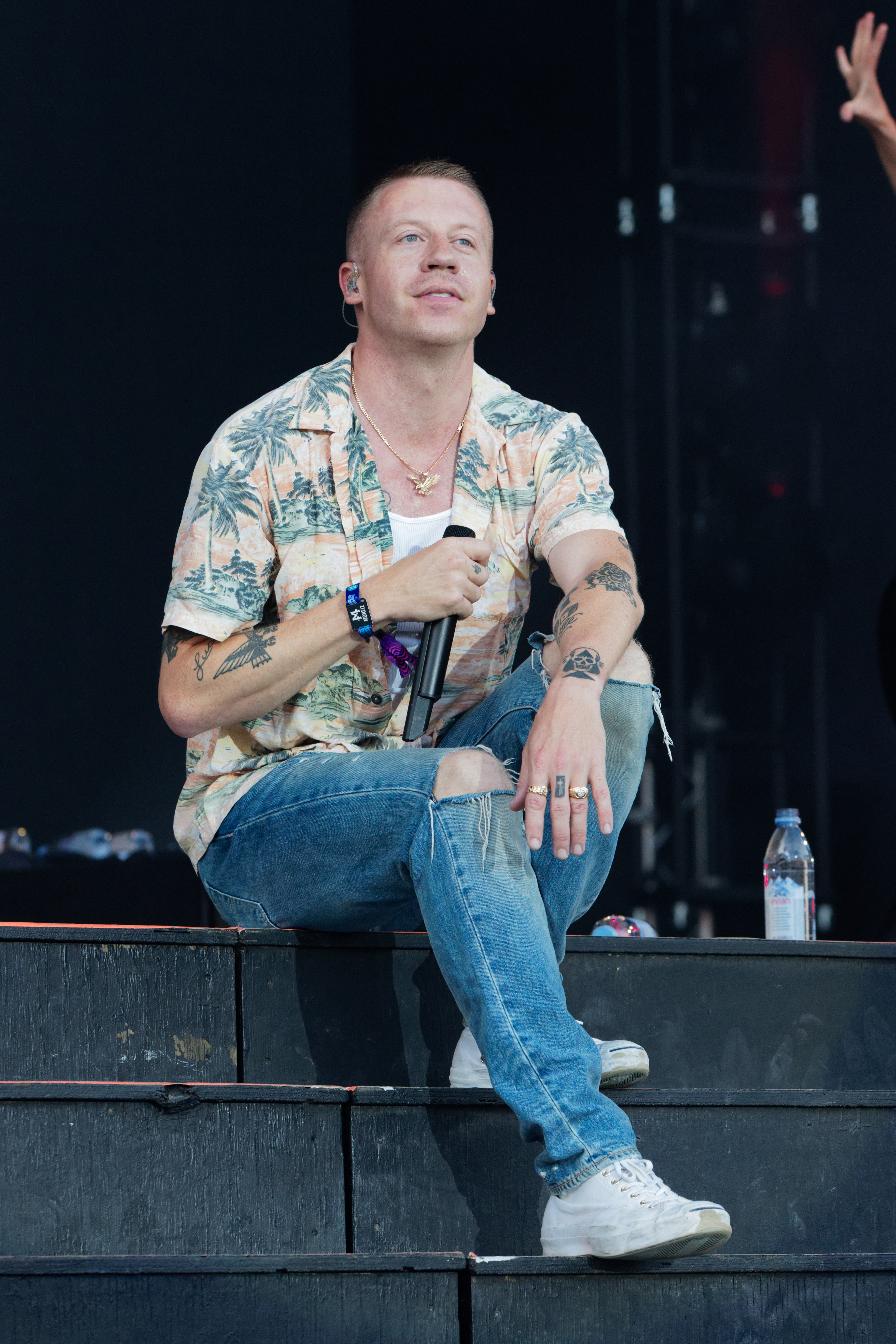 Mackelmore & Ryan Lewis en concert lors du festival des vieilles charrues 2017.